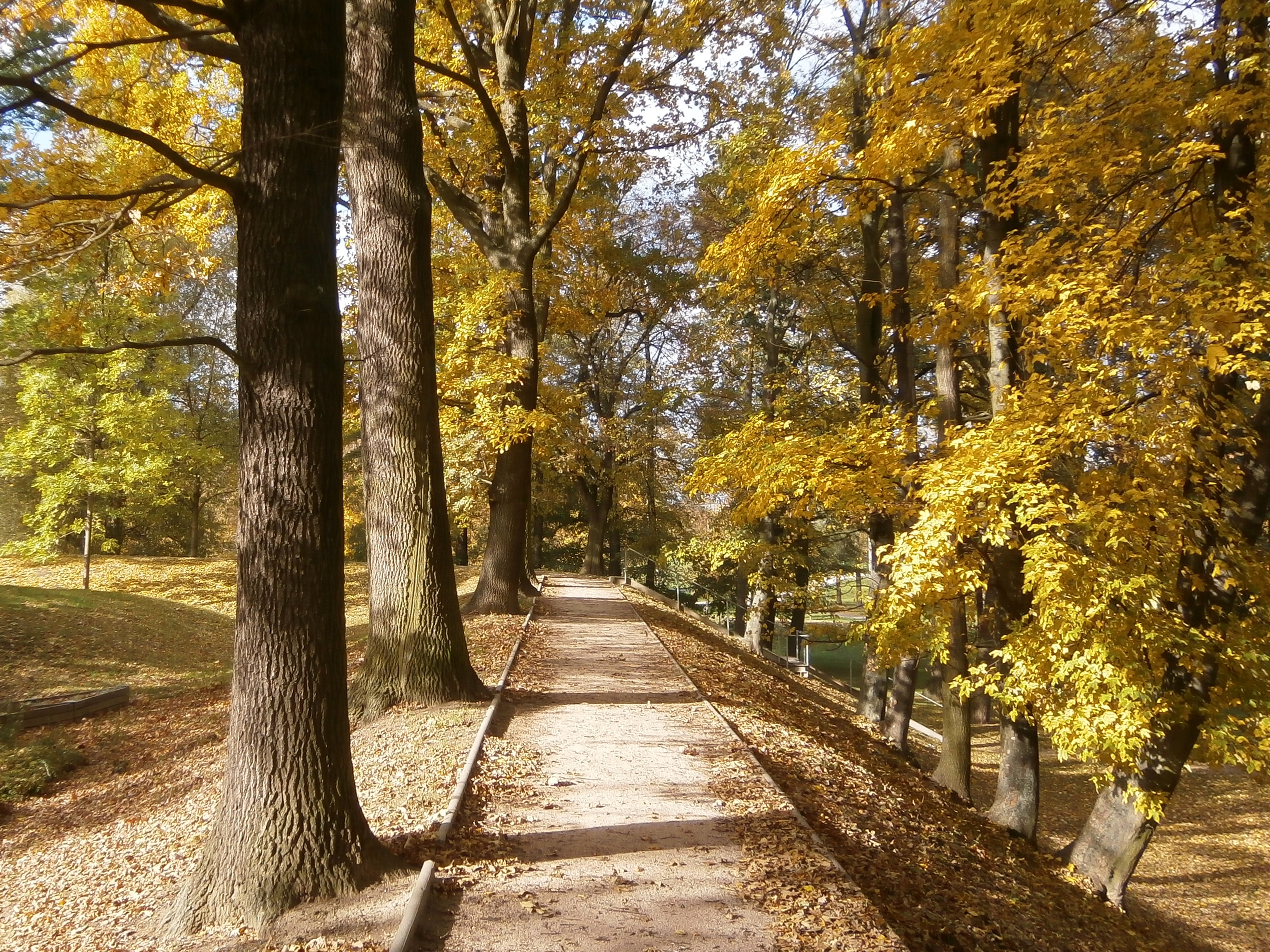 Šimkovy sady (Hradec Králové)